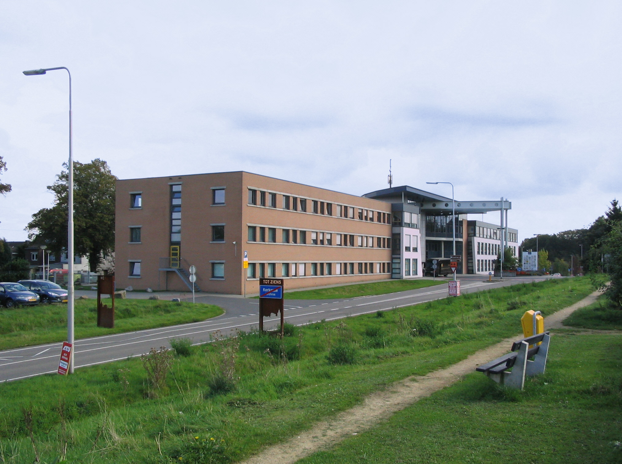 EBC (D-NL-Grenze)